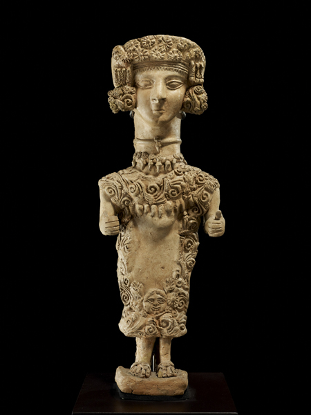 Dama de Ibiza (Colonización púnica). Número de inventario: 1923-60-541.